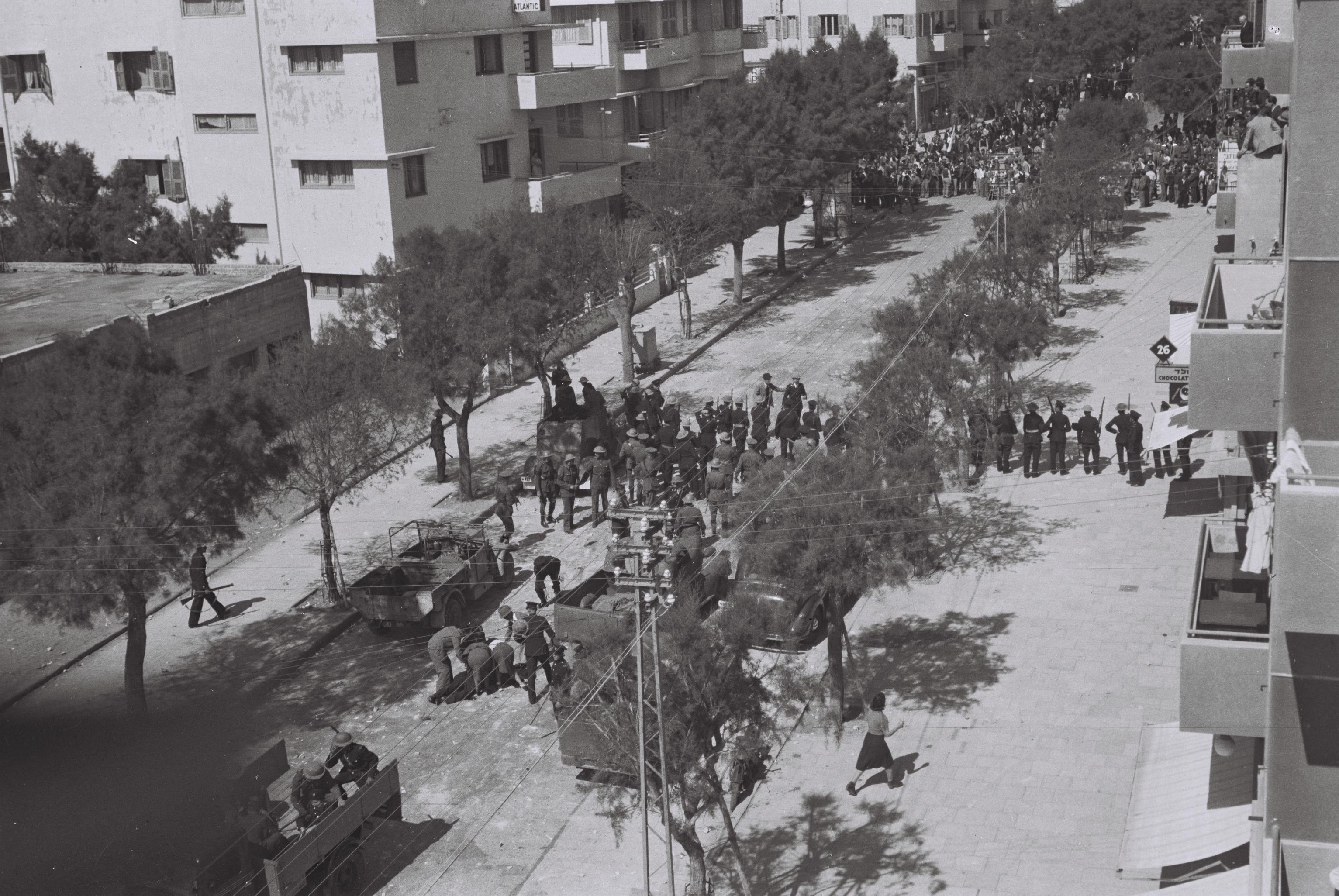 27 במאי 1939, אנשי משטרת המנדט חוסמים את רחוב אלנבי בפני מפגינים נגד גזירות הספר הלבן.